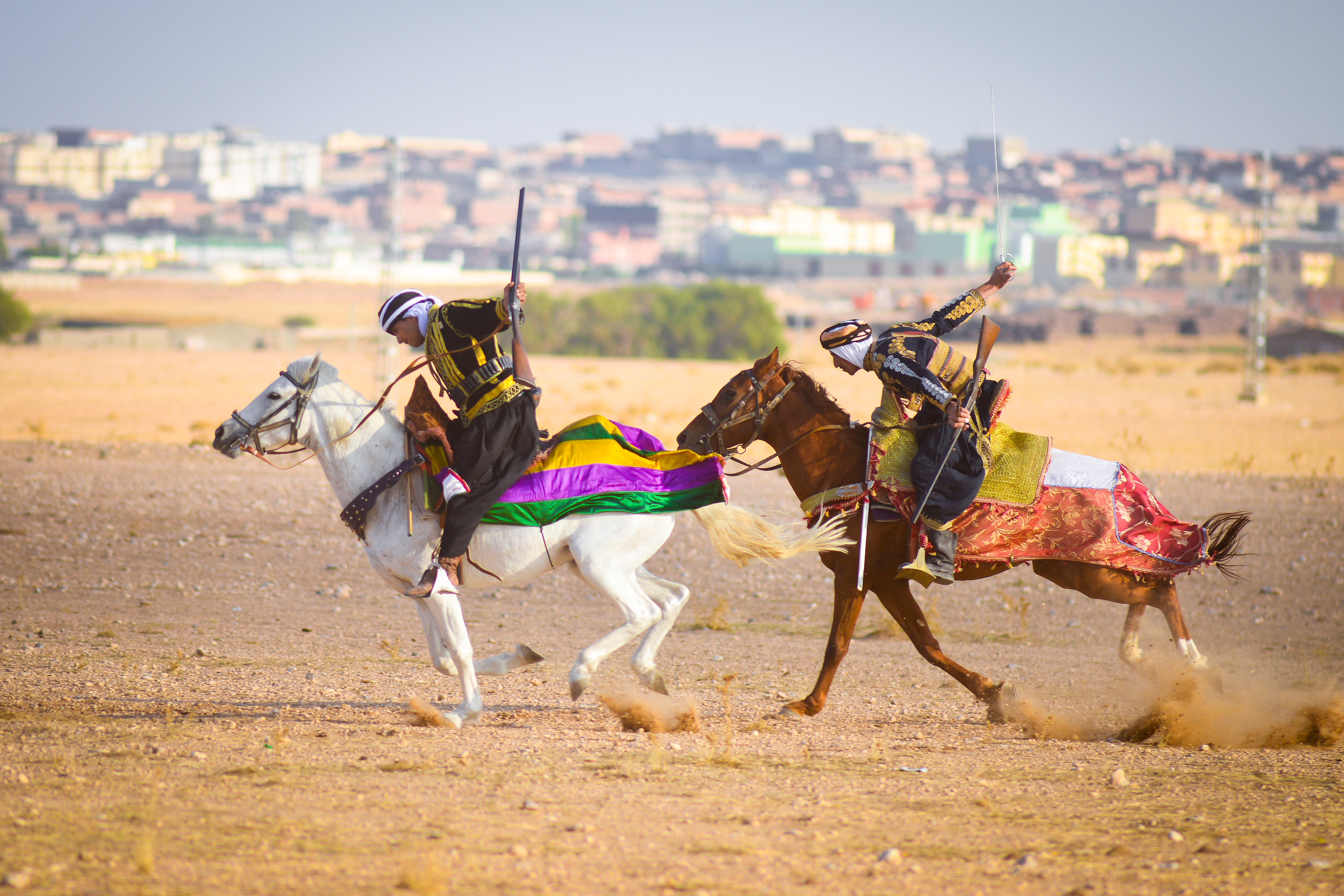 الفانتازيا؛ وتسمى أيضا الخيالة والباردية والتّبُوريدَة وصحاب البارود اسم يطلق على عروض فروسية، تحاكي هجمات عسكرية، تمارس في بلدان المغرب العربي، في مختلف مناطقها، العربية والأمازيغية والصحراوية، إضافة إلى بلدان أوروبية كفرنسا وبلجيكا، بين جالياتها المغاربية تمتد التسمية أيضا يطلق على النوع الرياضي المرتبط بهذا الفن. تكمن رمزيتها في تجسيدها لتعلق شعوب المغرب العربي بالأحصنة والفروسية، التي تمثل رمزاً تاريخياً وتراثياً تتوارث الأجيال العناية به. يتم في مشاهد الفانتازيا استخدام بعض ألعاب الخيل أو البارود من خلال تمثيليات لبعض الهجمات يشنها فرسان على متن خيولهم المزينة، مطلقين لعيارات من البارود. وهي ذات شعبية واسعة لدى الجمهور، وتشكل الفرجة الرئيسية للمهرجانات الثقافية والفنية (المعروفة ب«الموسم» أو «الوعدة»)، التي تنظم في المناطق القروية المغاربية. وتتمتع بجاذبية قوية بسبب قدرتها على إبهار المشاهدين بفضل صبغة الغموض والأساطير التاريخية القديمة التي تجعلها تضفي تأثيرا وسحرا خاصين علي محبي تلك المشاهد كانت الفانتازيا ثابتا في الاحتفالات والأعياد الكبرى، مثل حفلات الزفاف والولادات والأعياد الدينية والمواسم الثقافية الفنية، ثم انحسرت تدريجيا، في بعض المناطق المغاربية إلى الجانب السياحي الثقافي البحت. مازالت الشعوب والقبائل المغاربية تحافظ قدر المستطاع على هذه العادة رغم المؤثرات الخارجية، أهمها العولمة، وهي تعتبر استحضارا لملاحمها العسكرية التاريخية، ورمزا للقوة والشجاعة والإقدام. This is an image with the theme "Play" from: Algeria